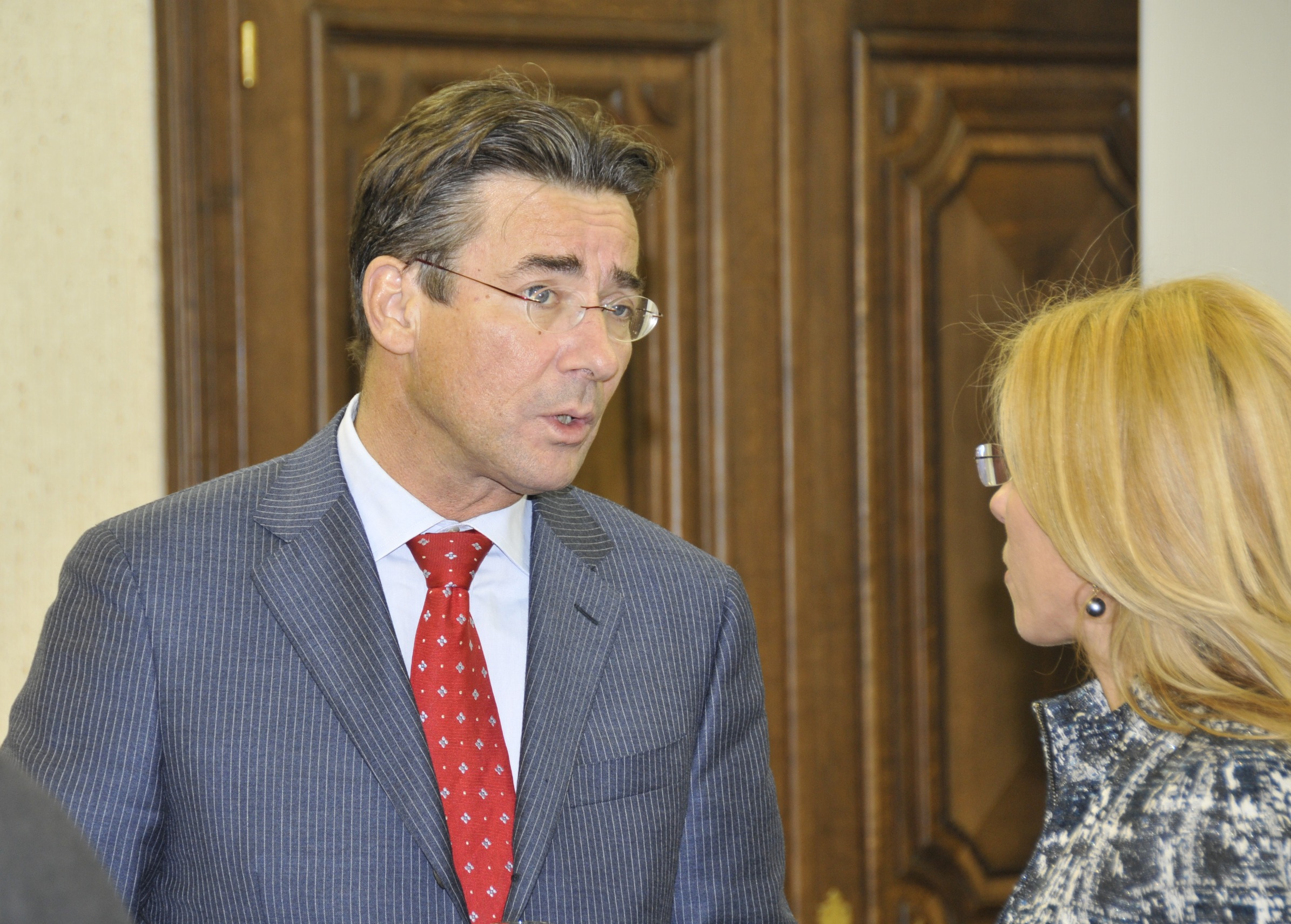 EPP Summit December 2010